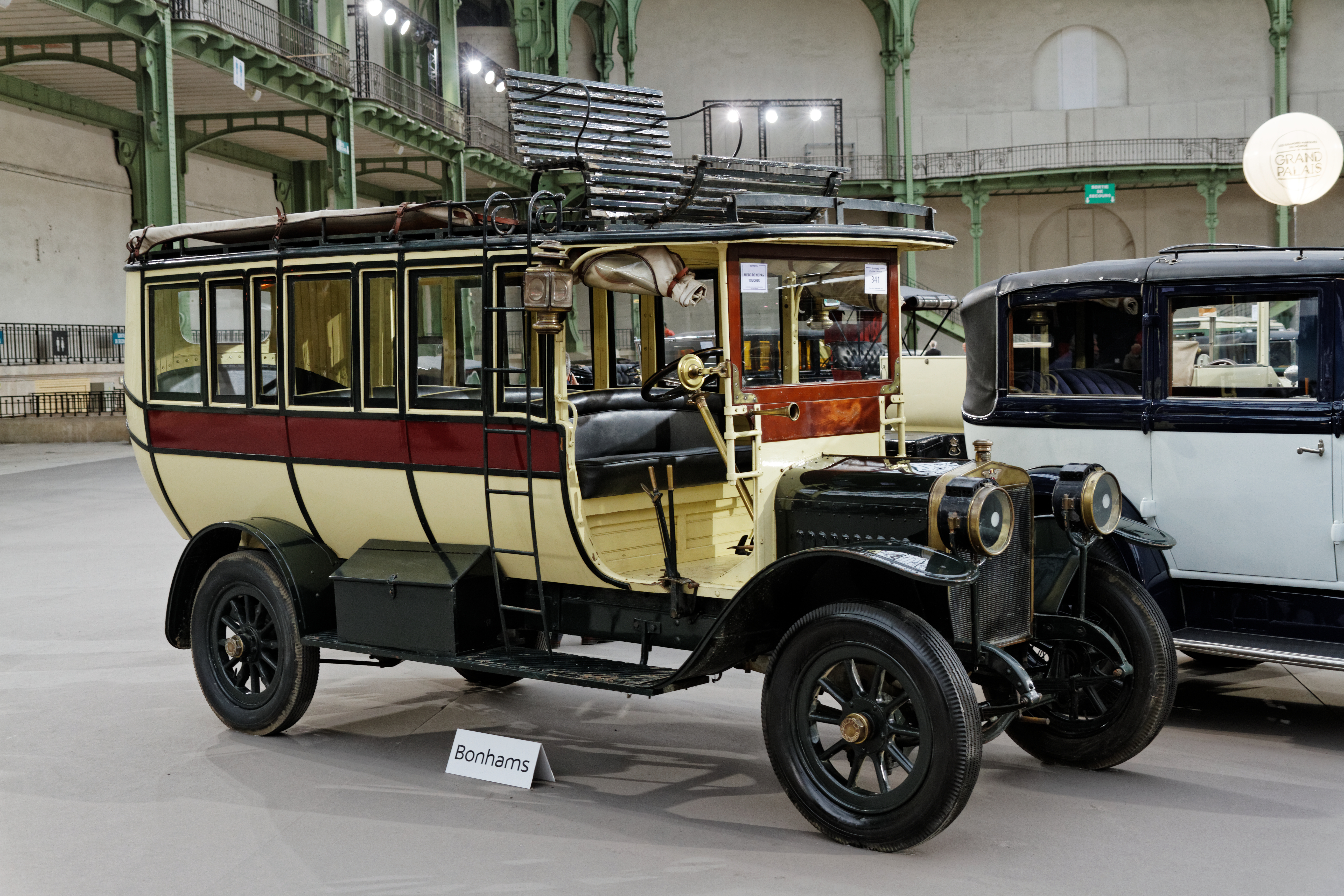 Une Hispano-Suiza 15 20HP Omnibus au Grand Palais lors de la vente Bonhams en février 2014.